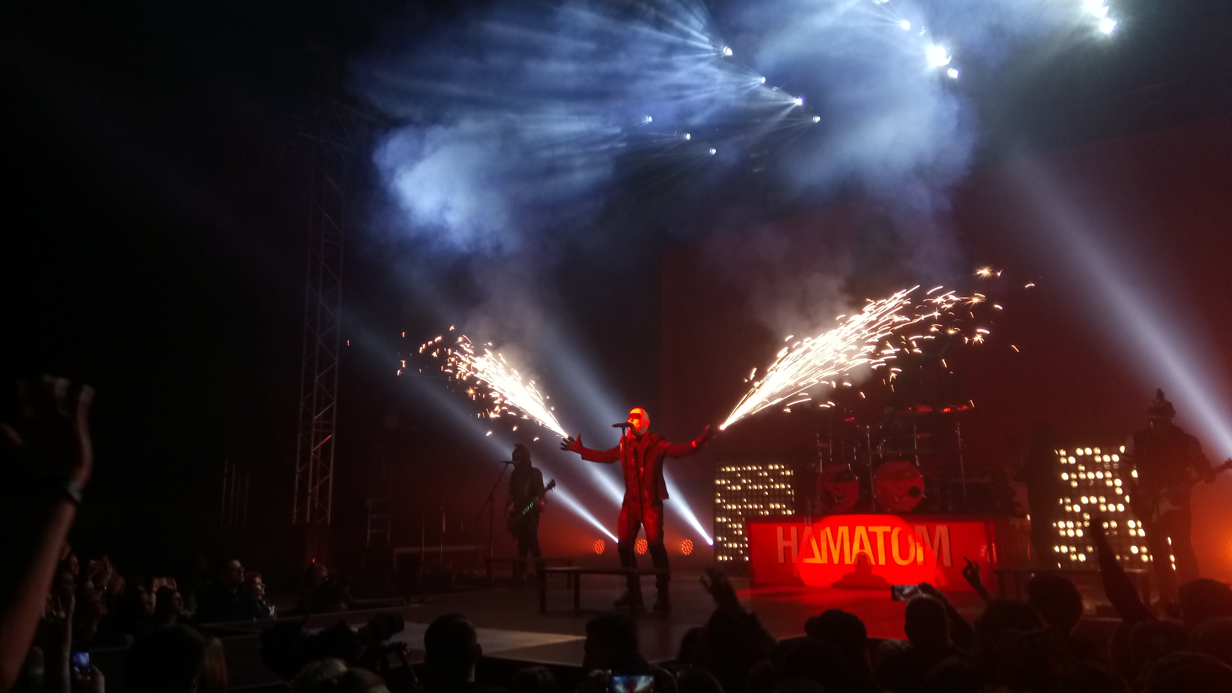 Hämatom - Megakoncert Monstrum kapely Dymytry (Praha, Malá sportovní hala, 23.3.2018)